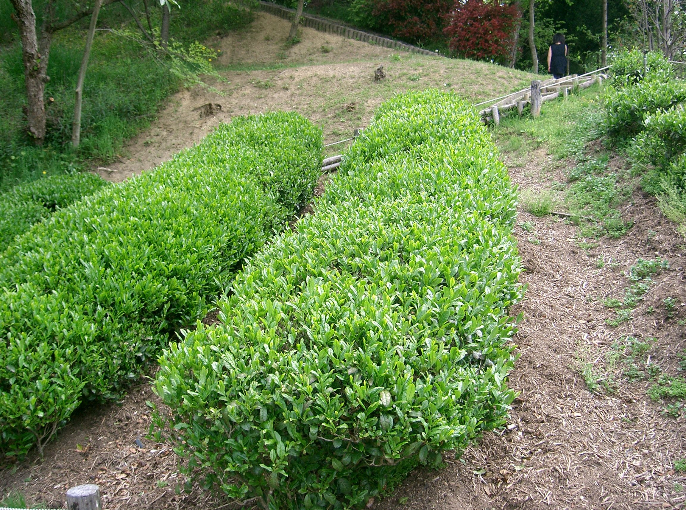 Camellia sinensis